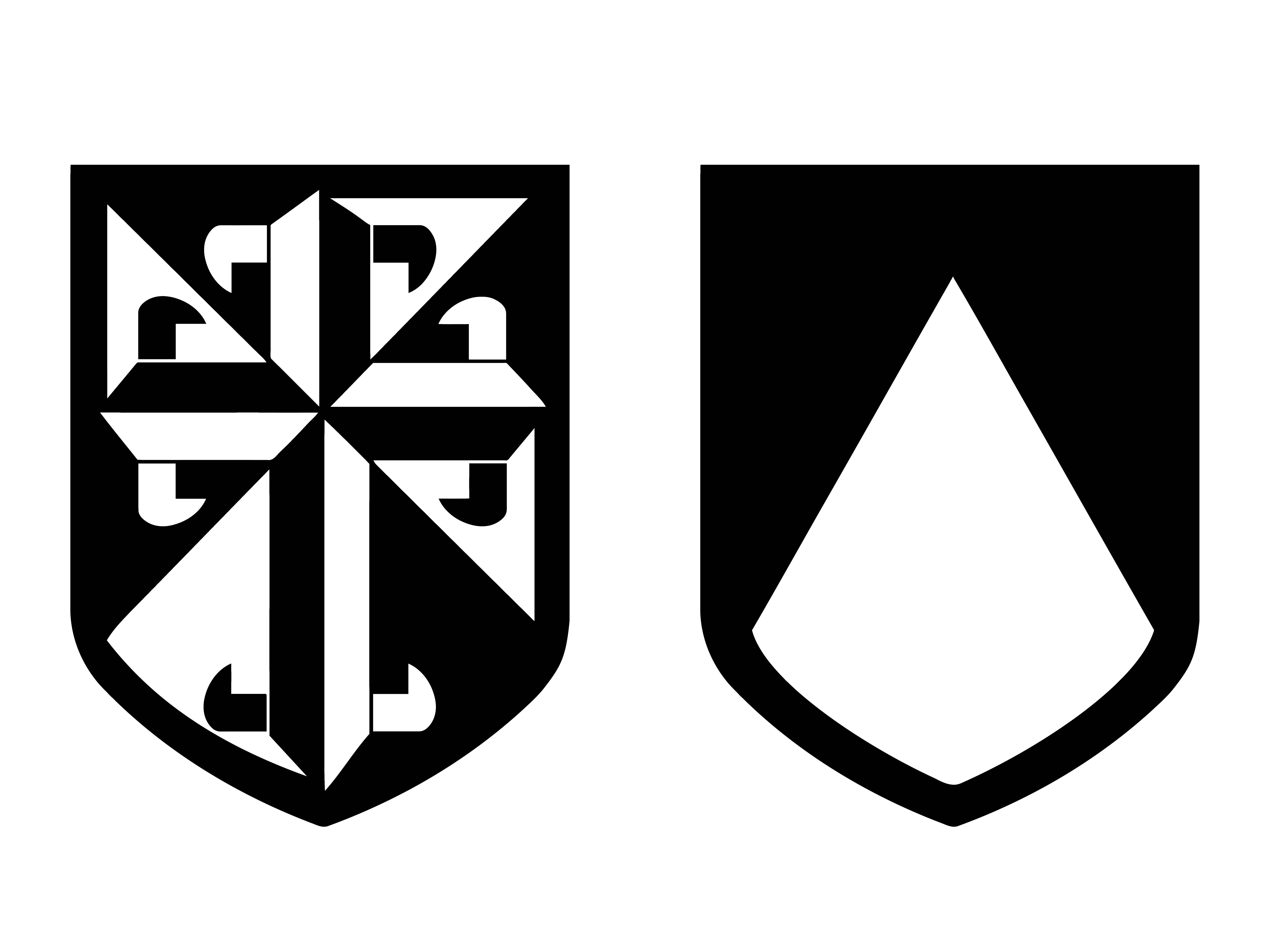 Escudos Orden de Predicadores